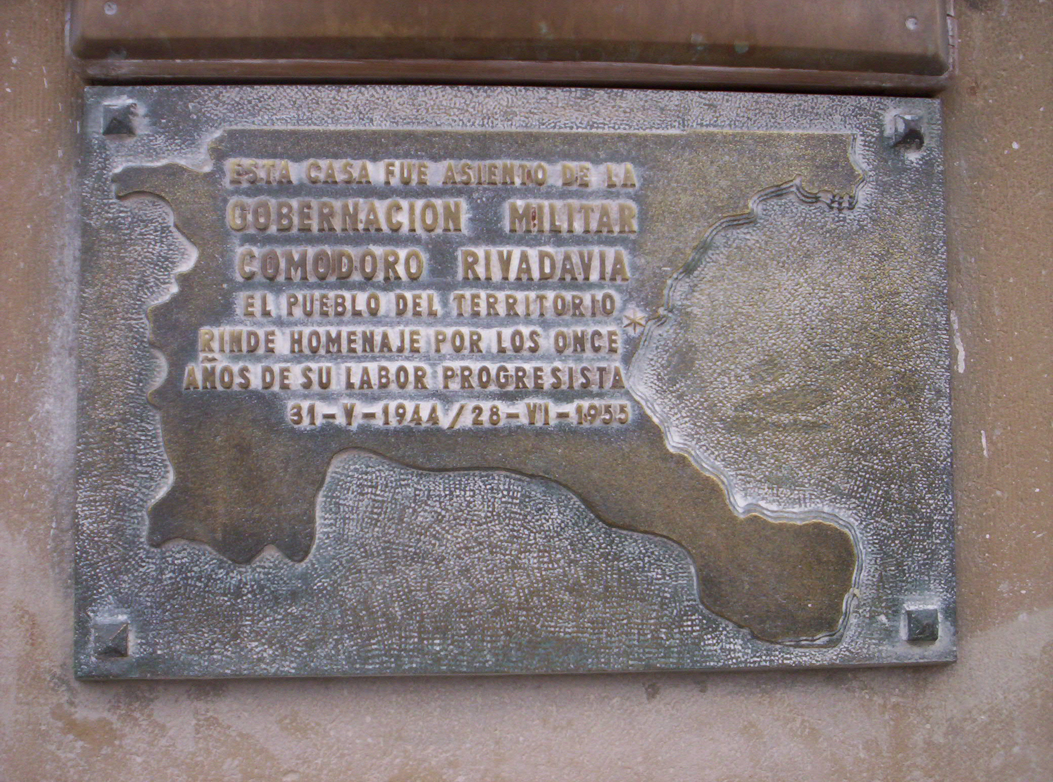 Homenaje a la antaña gobernación en edificio comodorense.